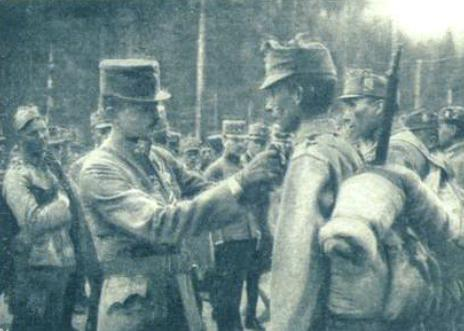 Cesar Karel pripenja odlikovanja po končani italijanski ofenzivi.